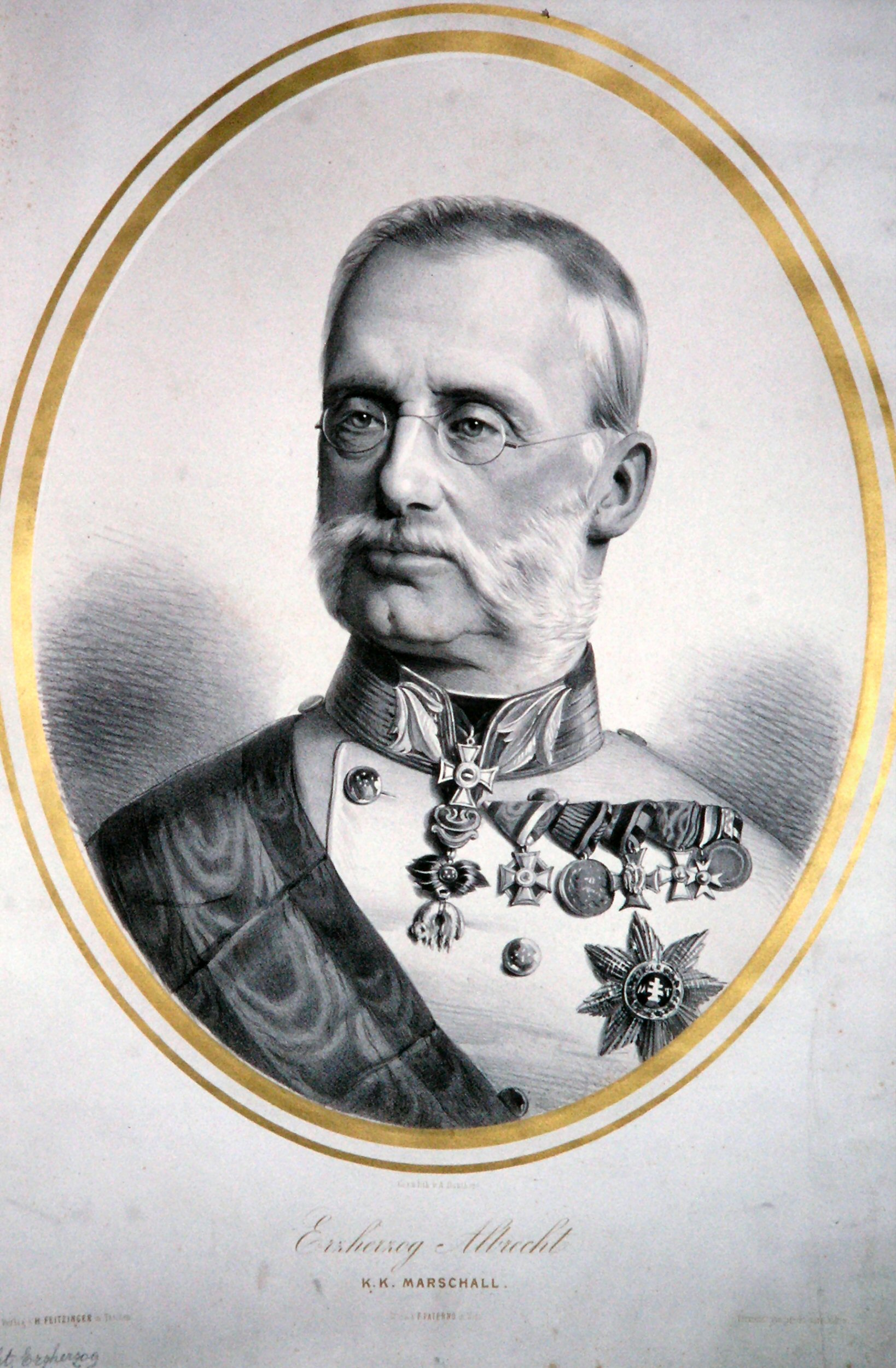 Albrecht von Österreich-Teschen (1817-1895), Erzherzog, österreichischer Feldmarschall. Lithographie von Adolf Dauthage, ca. 1870